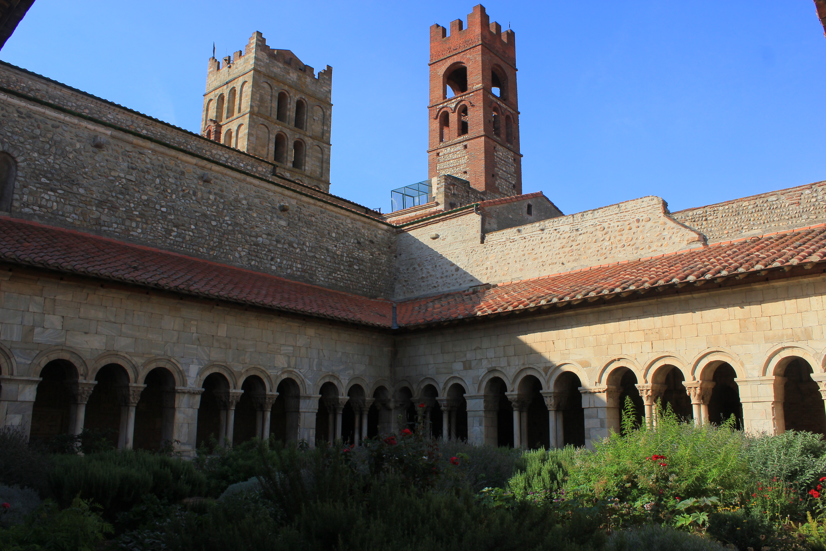 Cathédrale d'Elne, le cloître